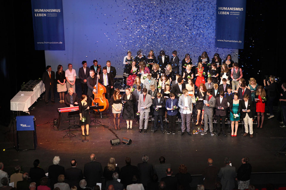 Jugendfeier in Hannover 2012